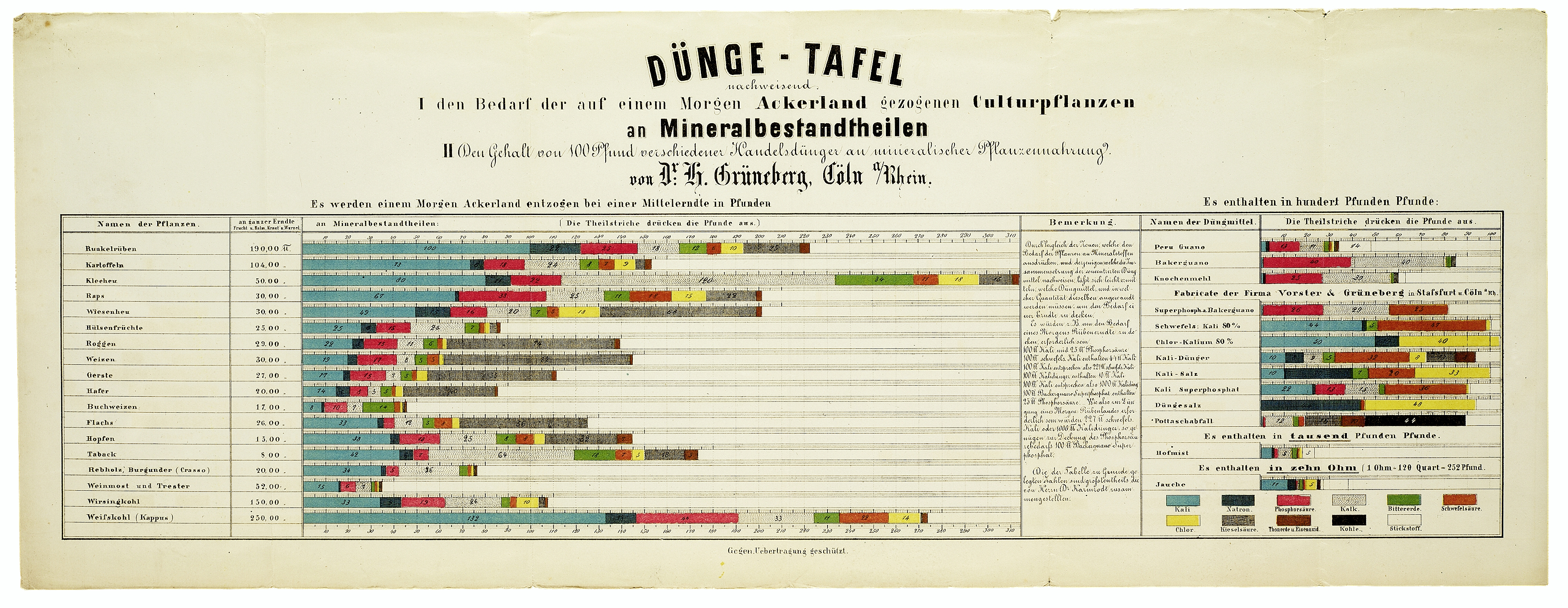 Düngetafel, historische Abbildung